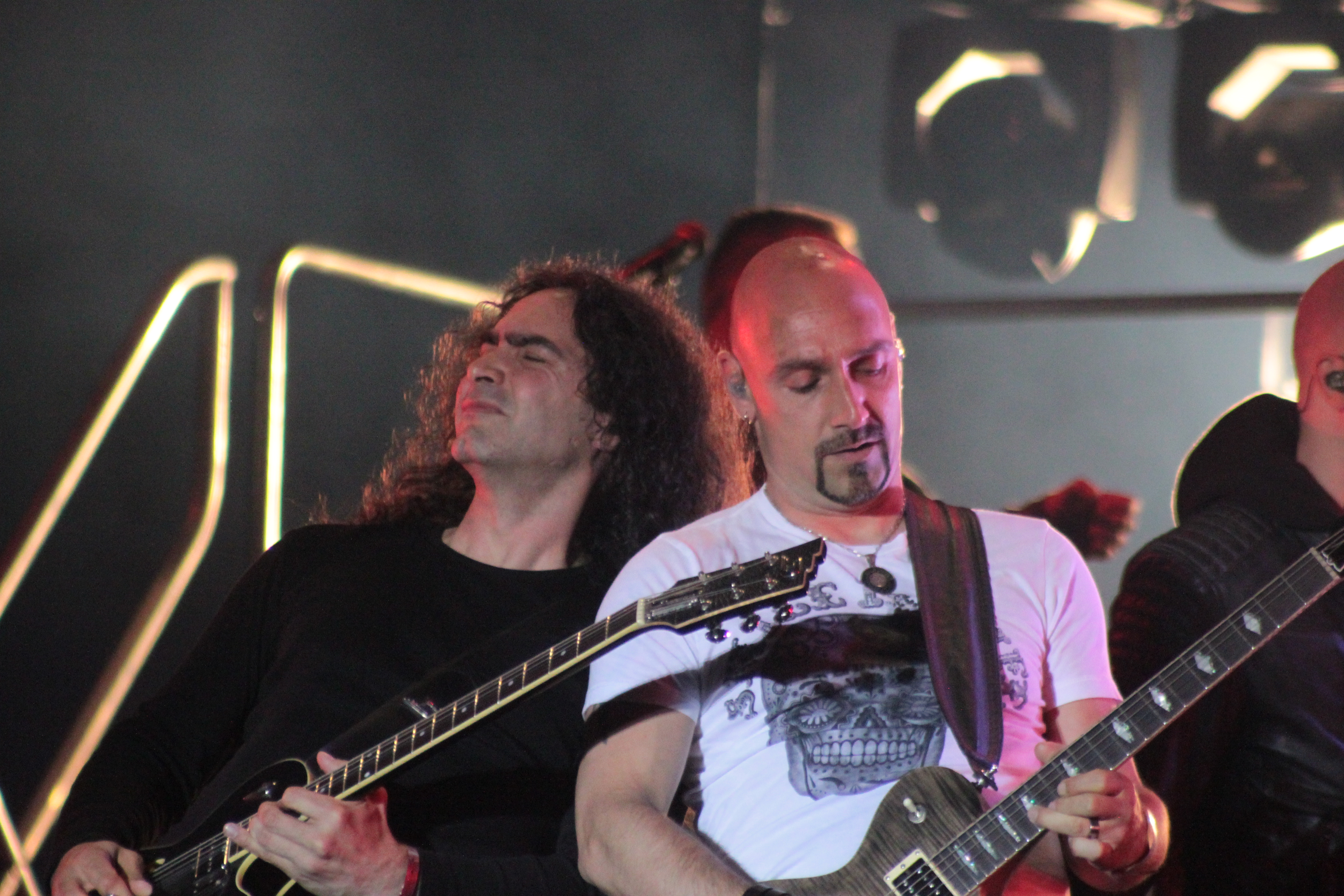 Avantasia, Helfest 2013, Fr-44-Clisson.